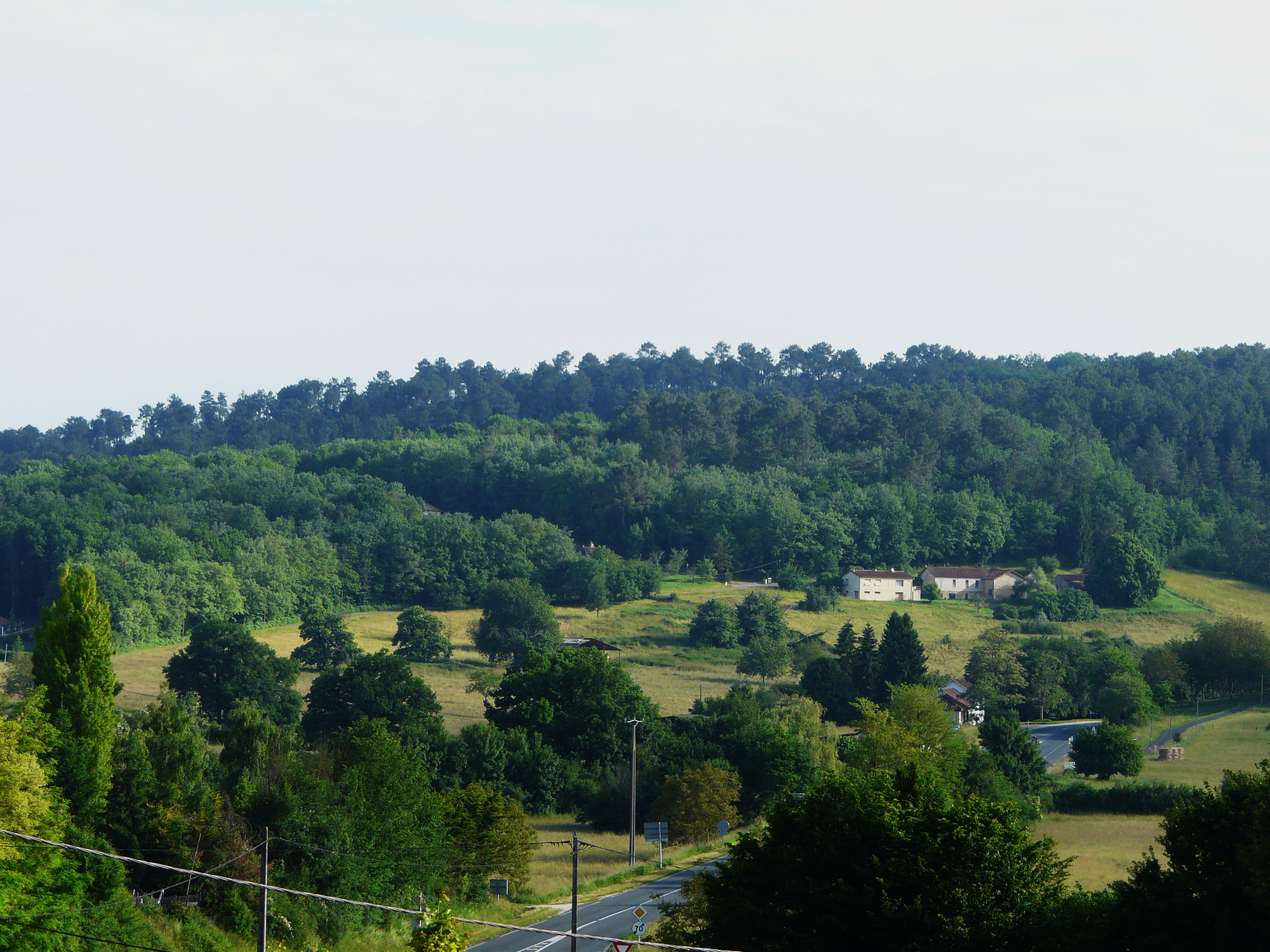 Coteau en rive droite du Vern vers le Champillou, Creyssensac-et-Pissot, Dordogne, France.